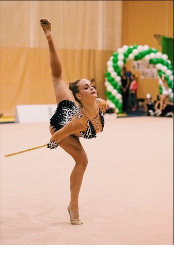 Lietuvos Meninės Gimnastikos Čempionatas